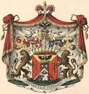 Barclay de Tolly suguvõsa vürstivapp